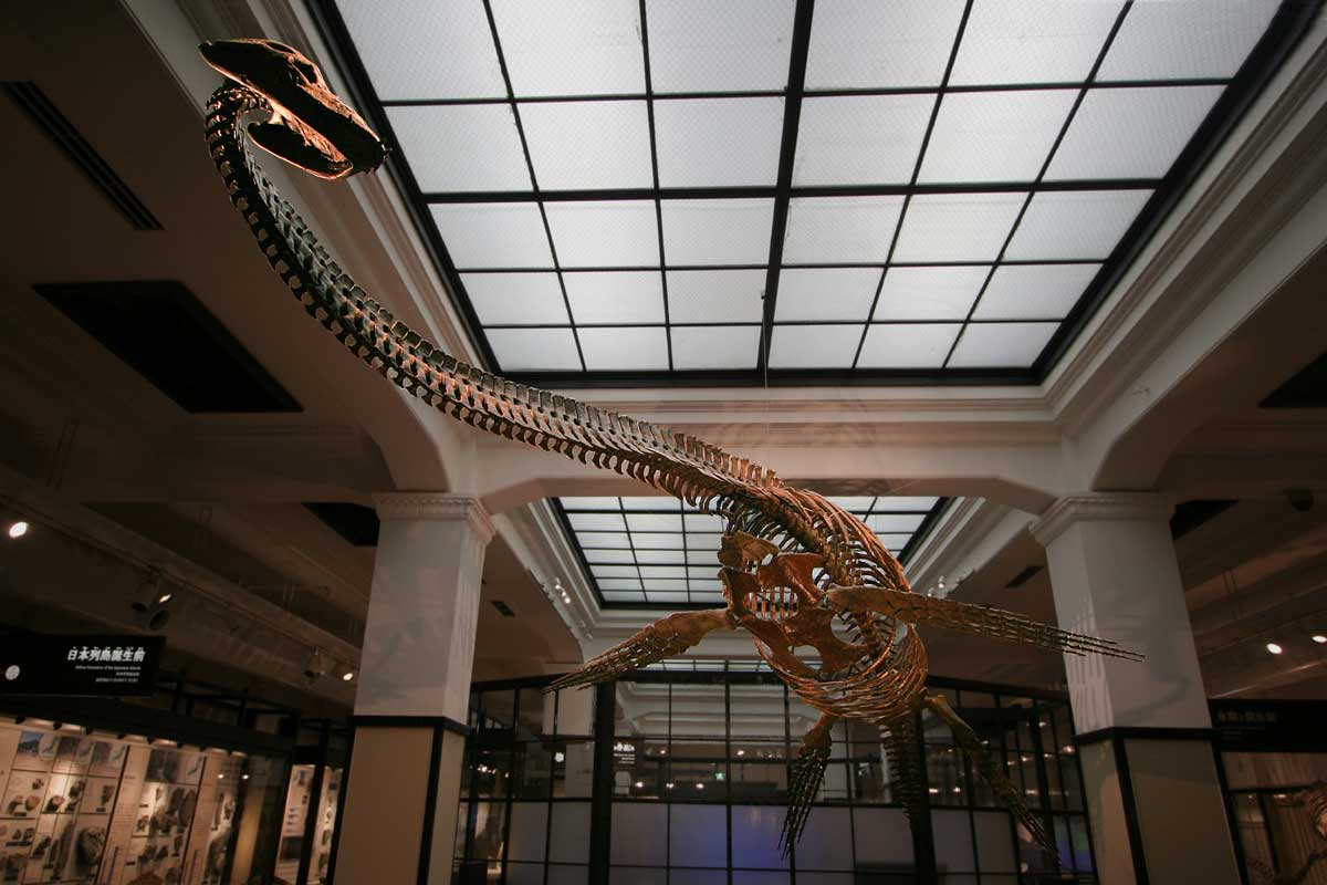 Futabasaurus - 01